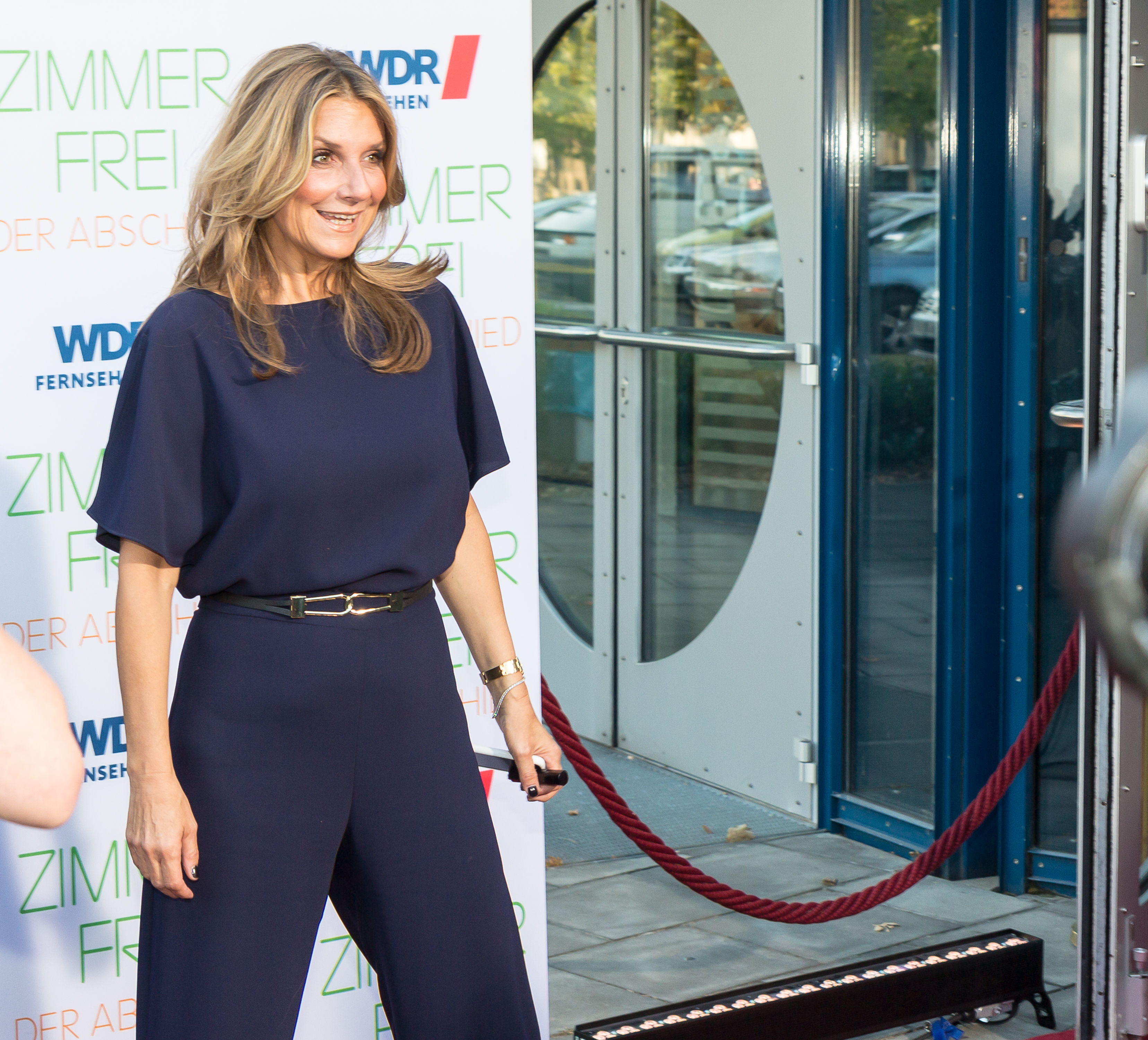 Zimmer frei - der Abschied Foto: Kim Fisher